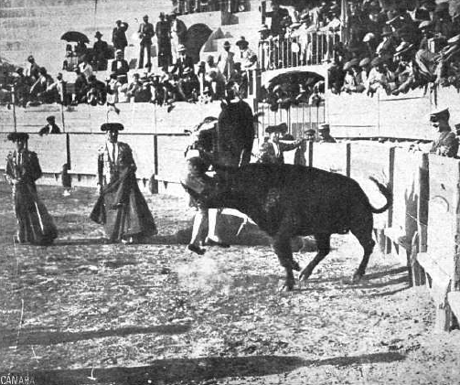 Momento de la cogida mortal sufrida por el matador Fermín Muñoz Corchaito en la plaza de toros de Cartagena